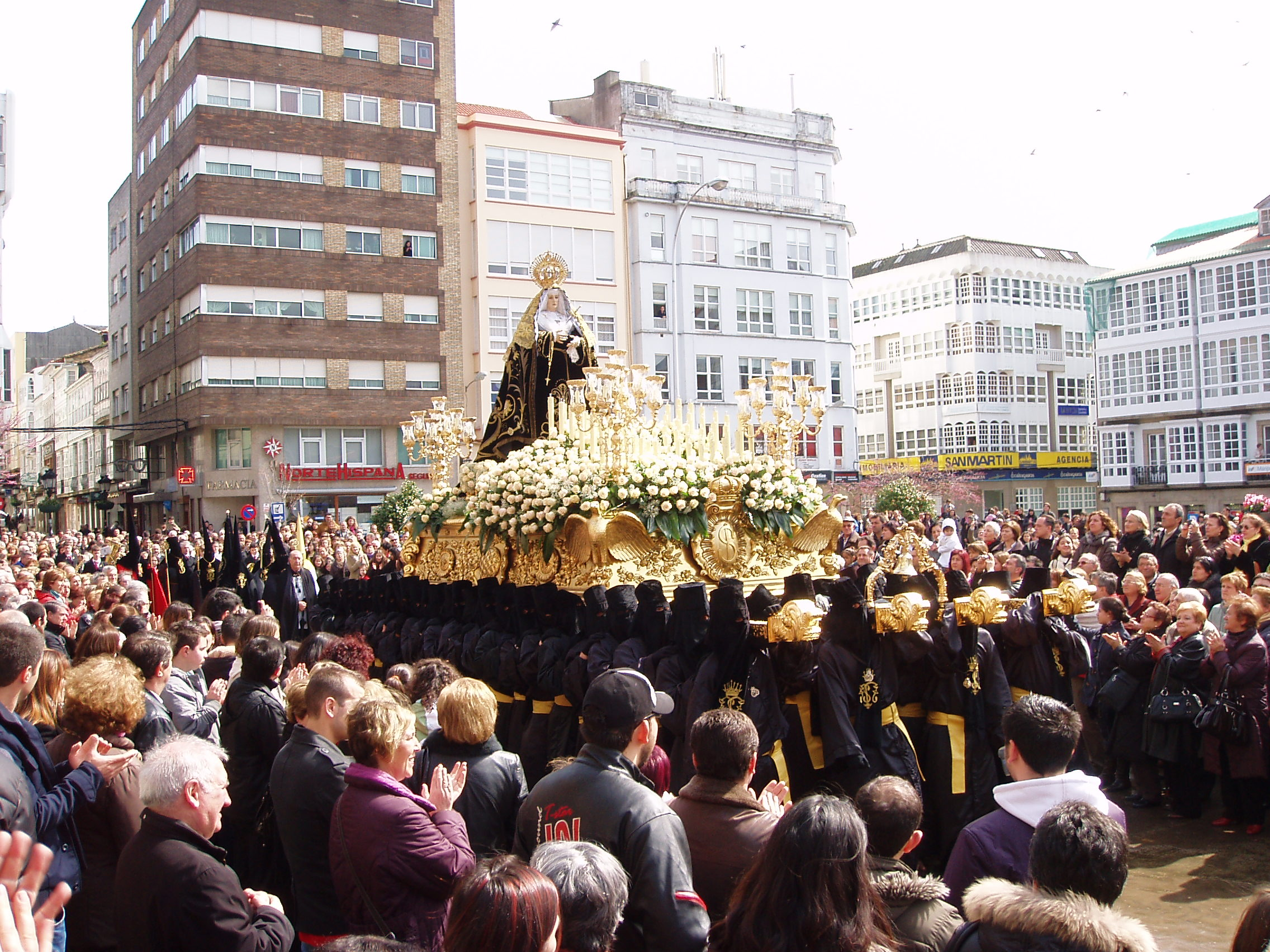 Trono de la Stma. Virgen de los Dolores en la Procesión del Santo Encuentro de 2010 en la Plaza de Armas de Ferrol.